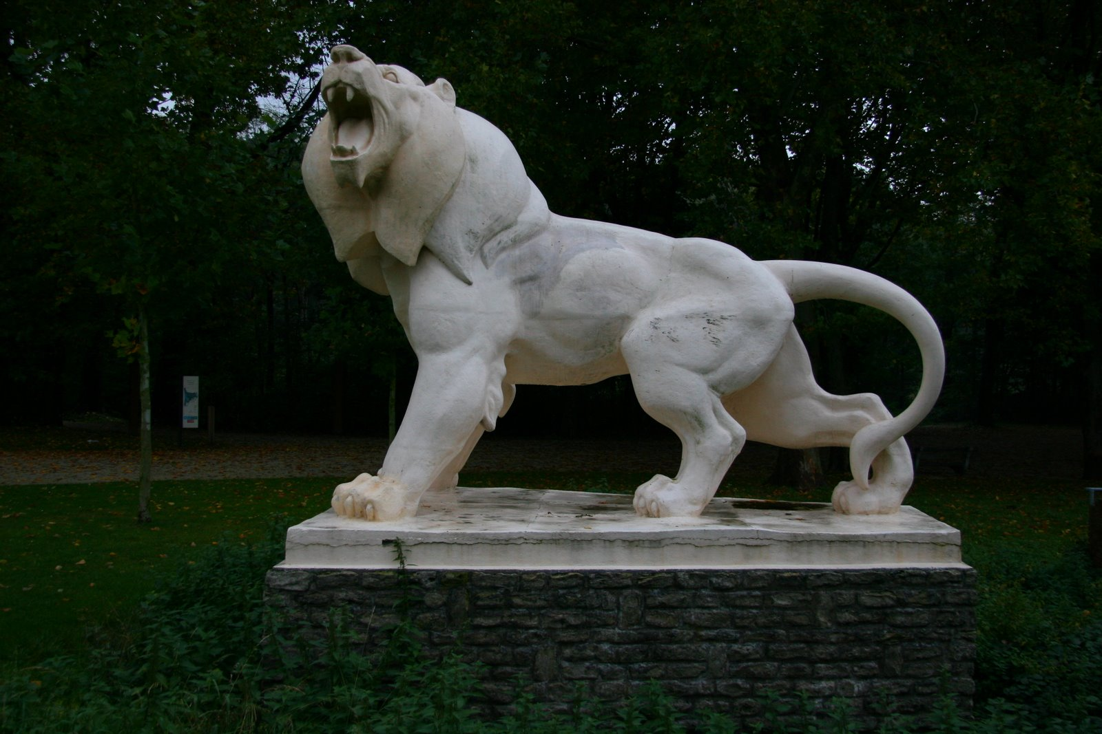 Oroszlánszobor a Parc Malou-ban (Brüsszel, Woluwe-St-Lambert)